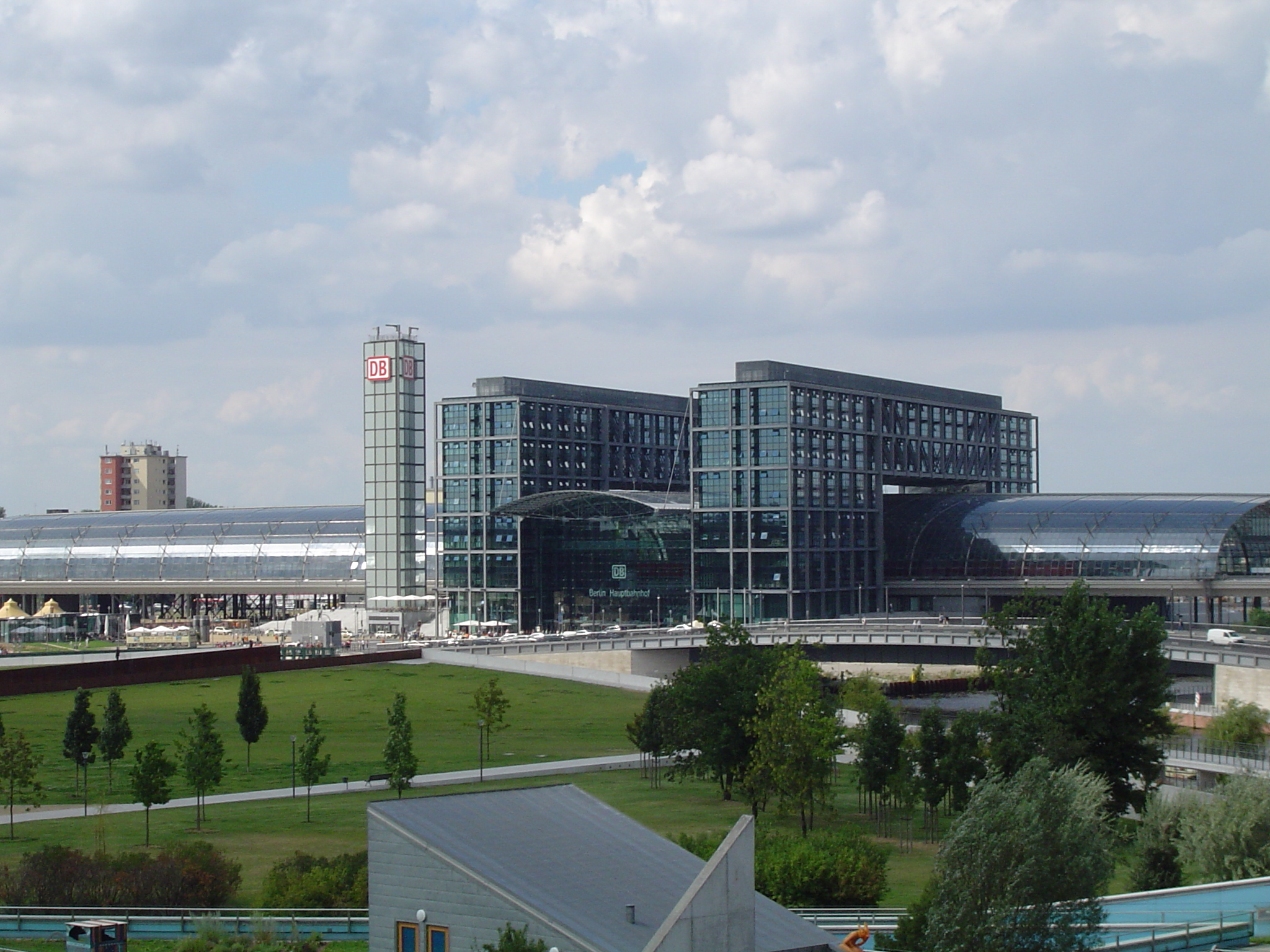 Berlin Main Station